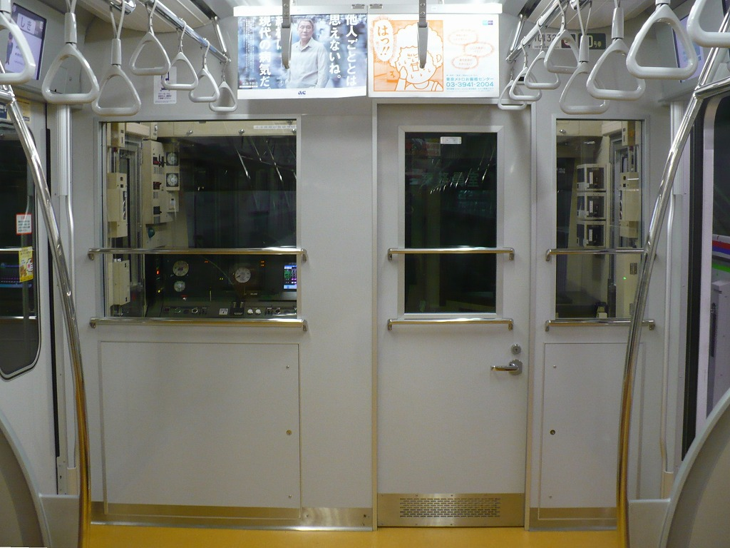 東京メトロ10000系内装